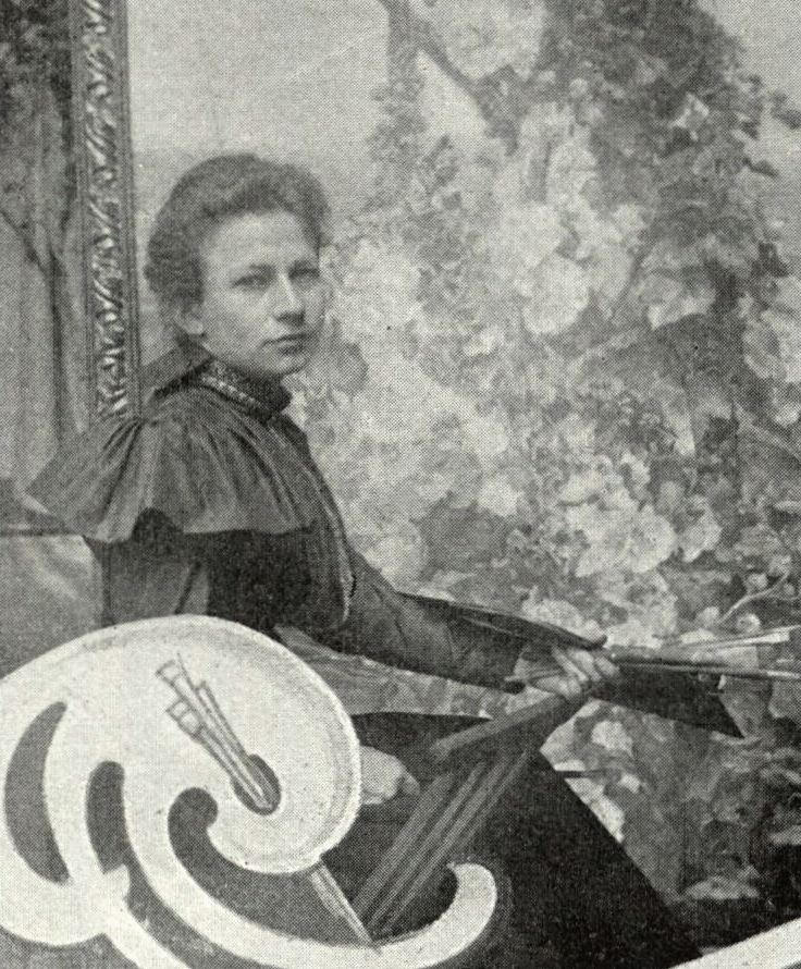 Portrét – Marie Urbanová - Zahradnická (1868-1945), Česká malířka.